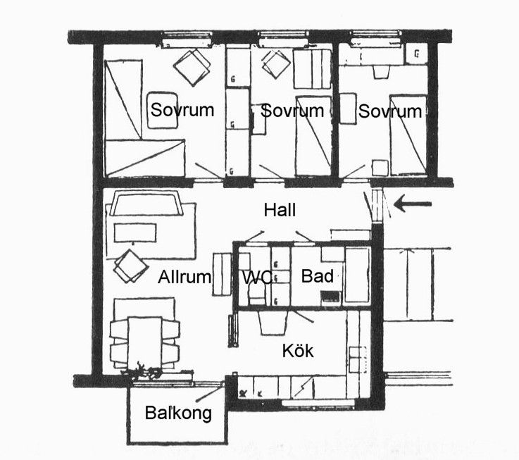 Baronbackarna, Örebro, lägenhetsplan, 4 r.o.k.